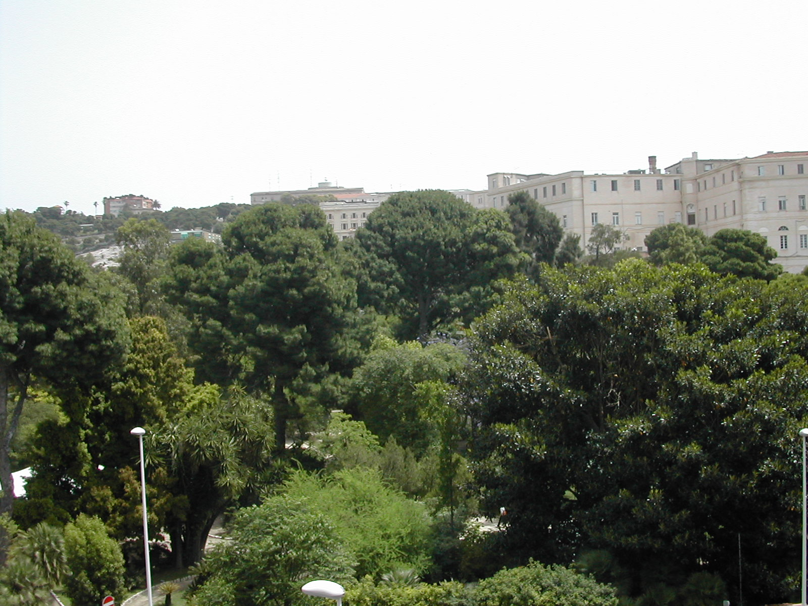 Veduta esterna dell' Orto Botanico di Cagliari da V.le St. Ignazio da Laconi